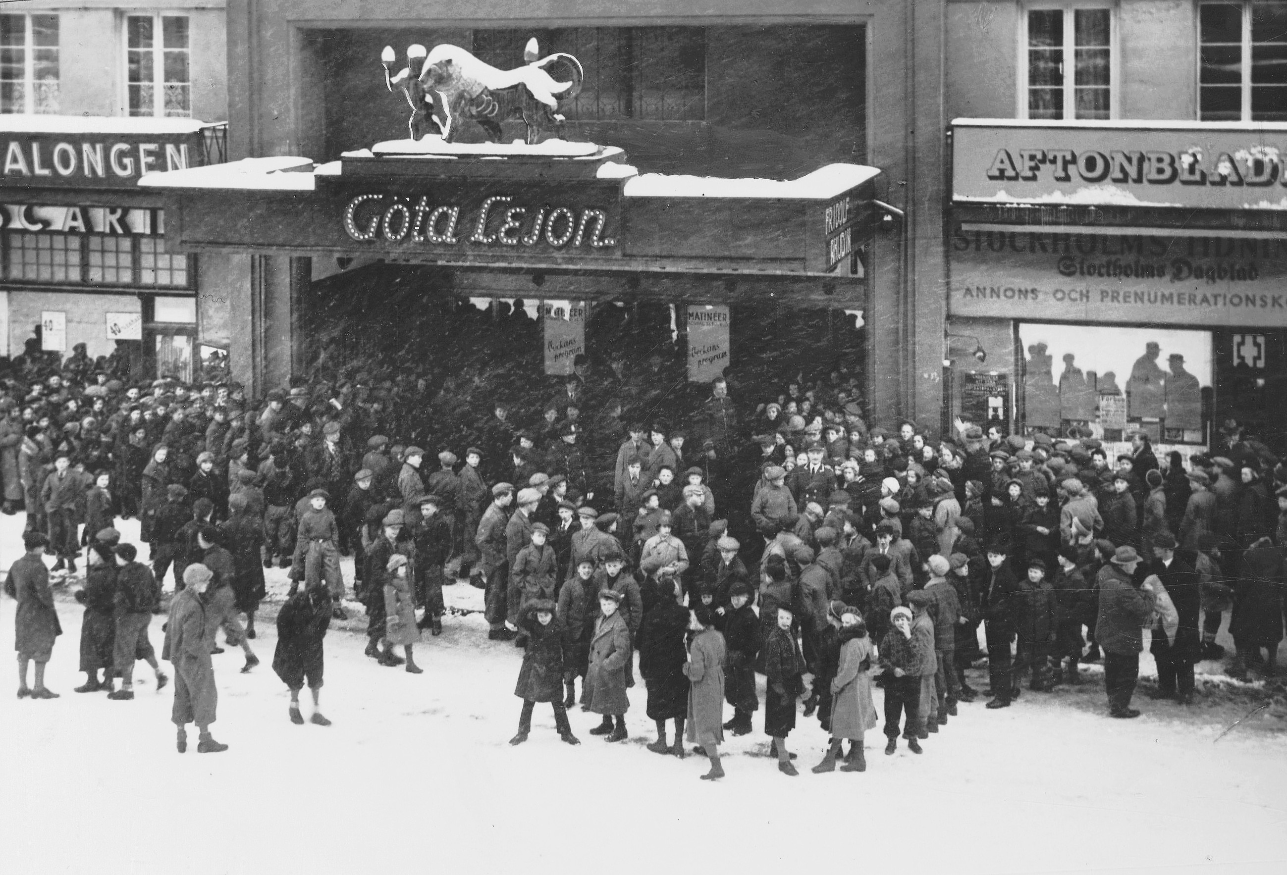 Folkträngsel utanför "Göta Lejon" i Stockholm vid visning av "Hemliga Svensson".